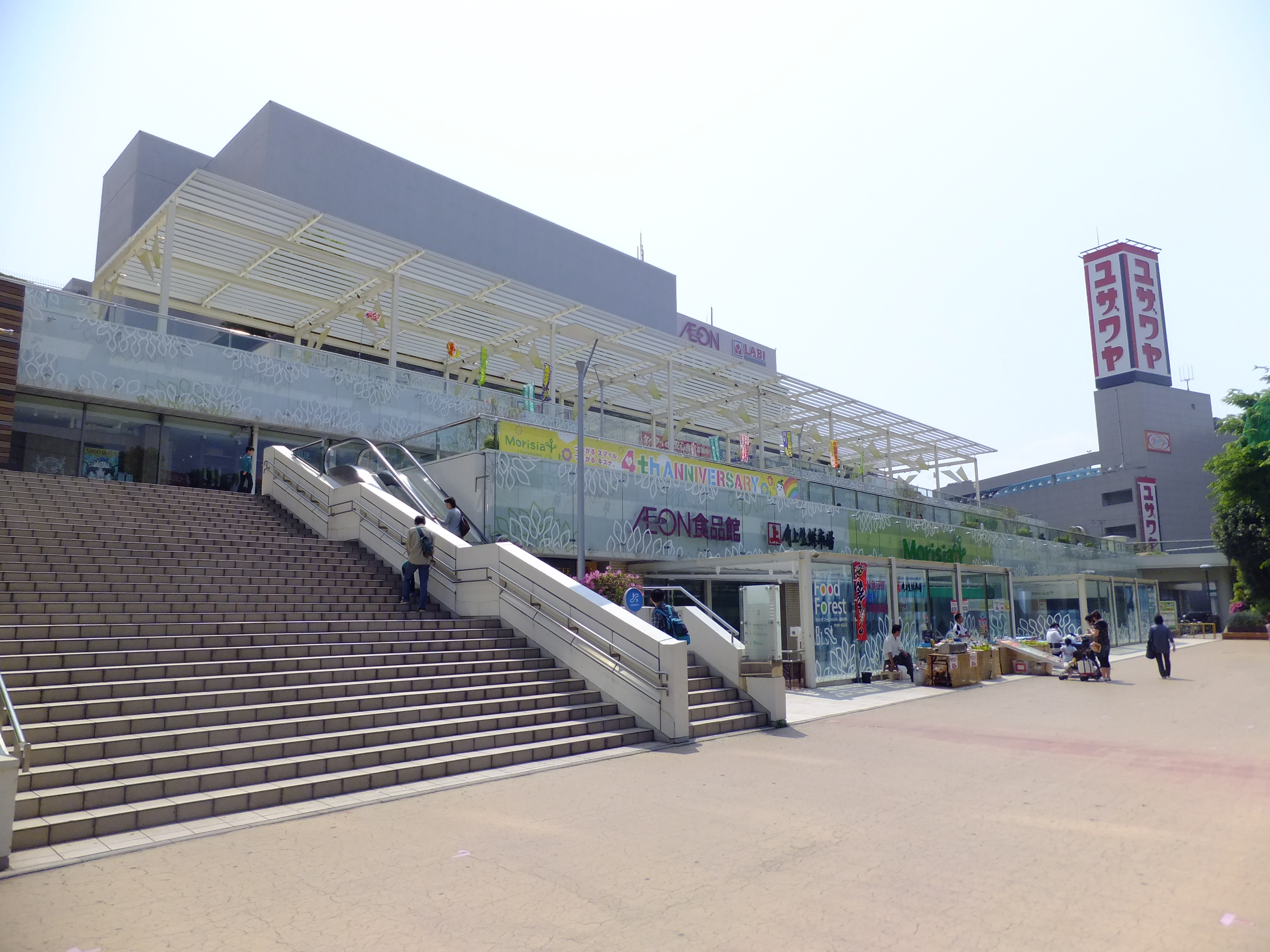 モリシア津田沼、地平レベルから、Morisia Shop棟